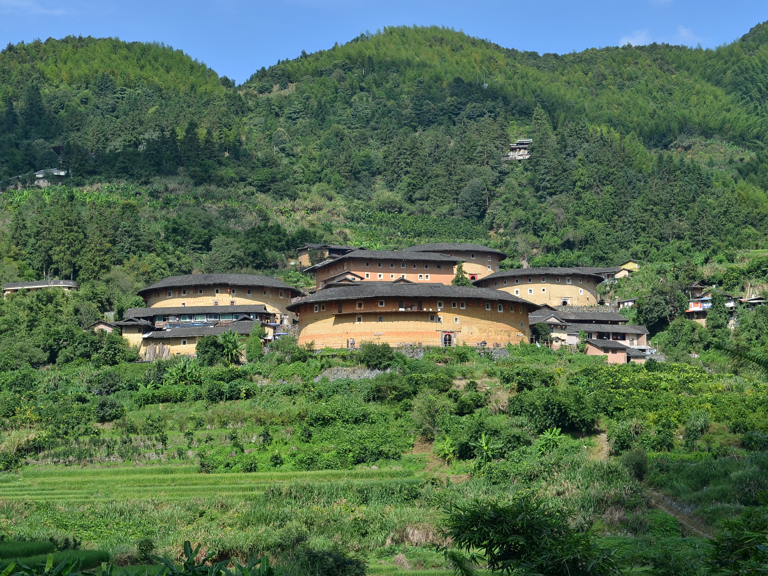 福建漳州南靖田螺坑土楼群